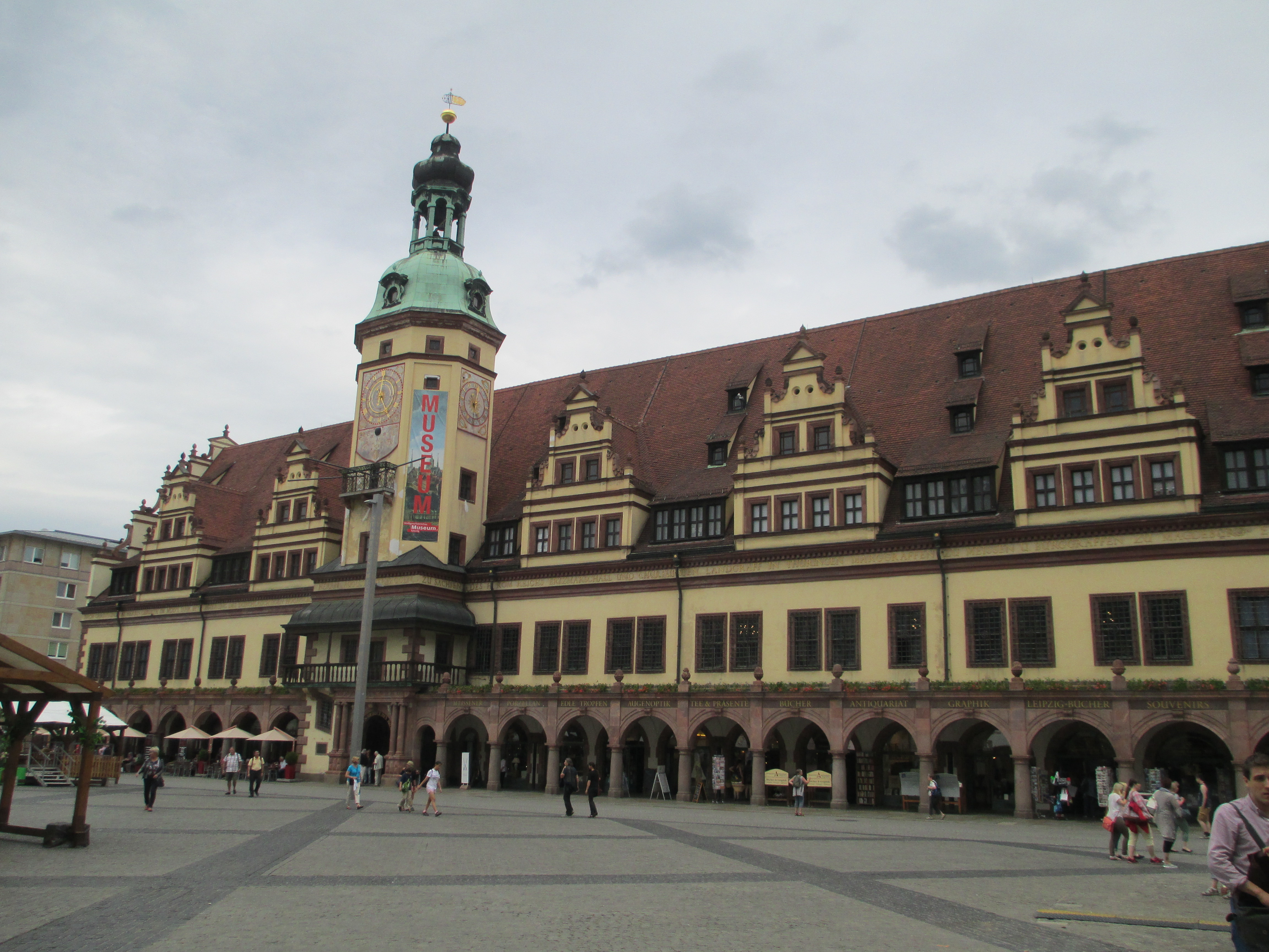 בית העירייה הישן של לייפציג